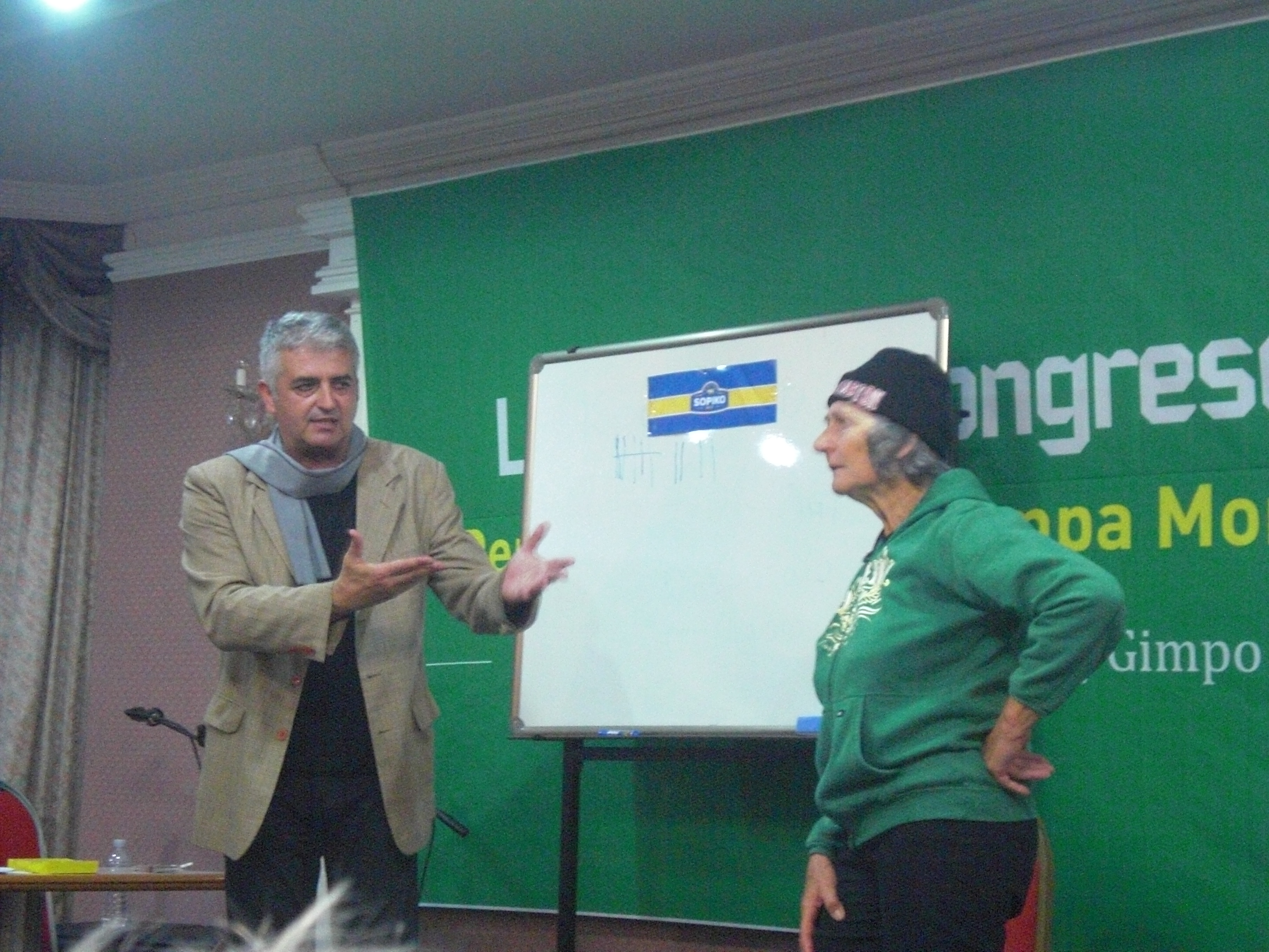 Malfermilo en 90-a SAT-Kongreso 2017.